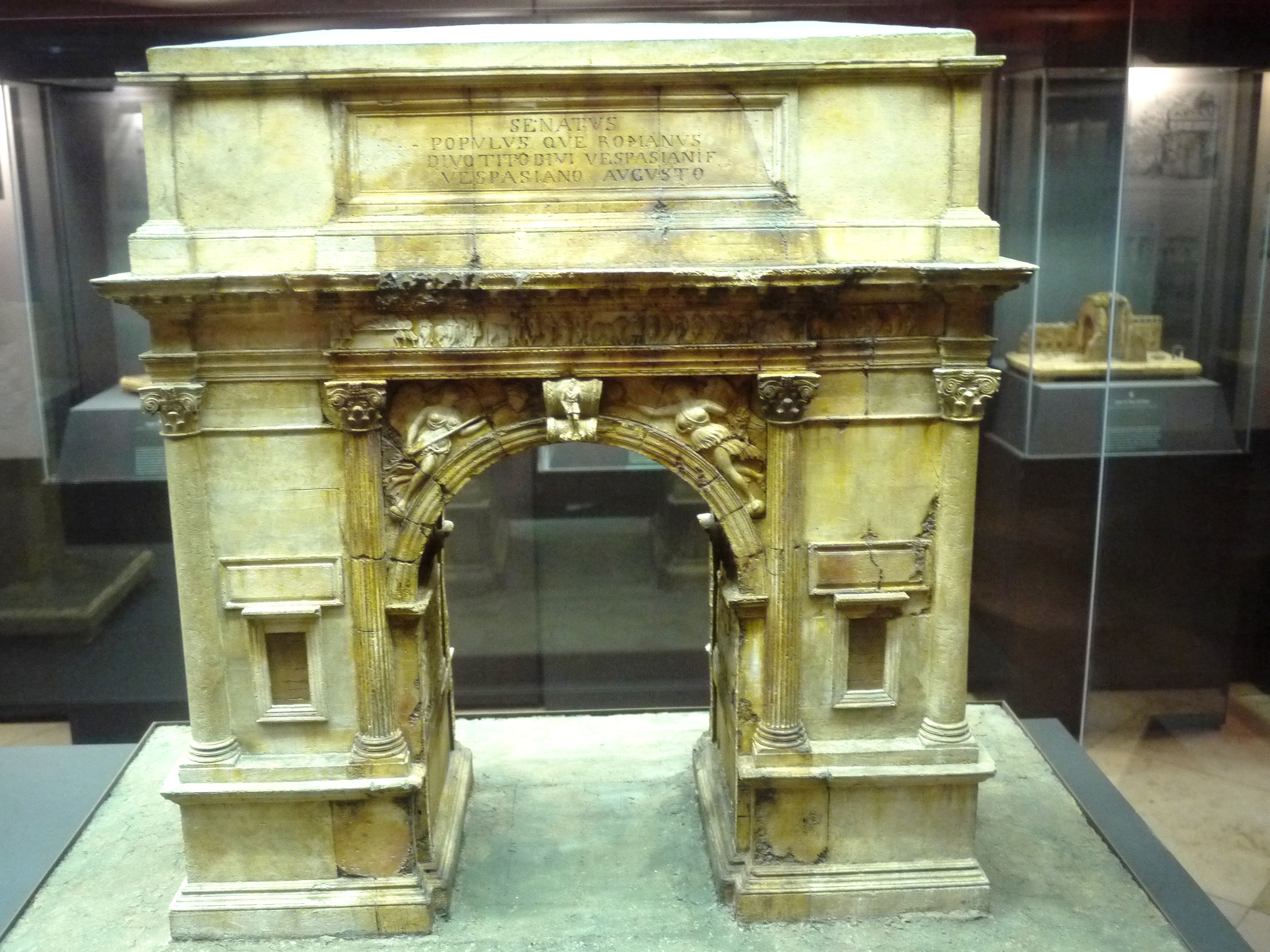 Korkmodell des konstantinischen Bogens (am Forum Boarium, dem Rindermarkt in Rom) aus der Werkstatt von Carl May und seinem Sohn in der Sammlung im Schloss Johannisburg in Aschaffenburg